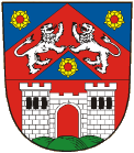 znak obce Lochovice, okres Beroun